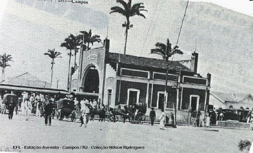 historisches Bild Bahnhof Avenida bei Campos RJ